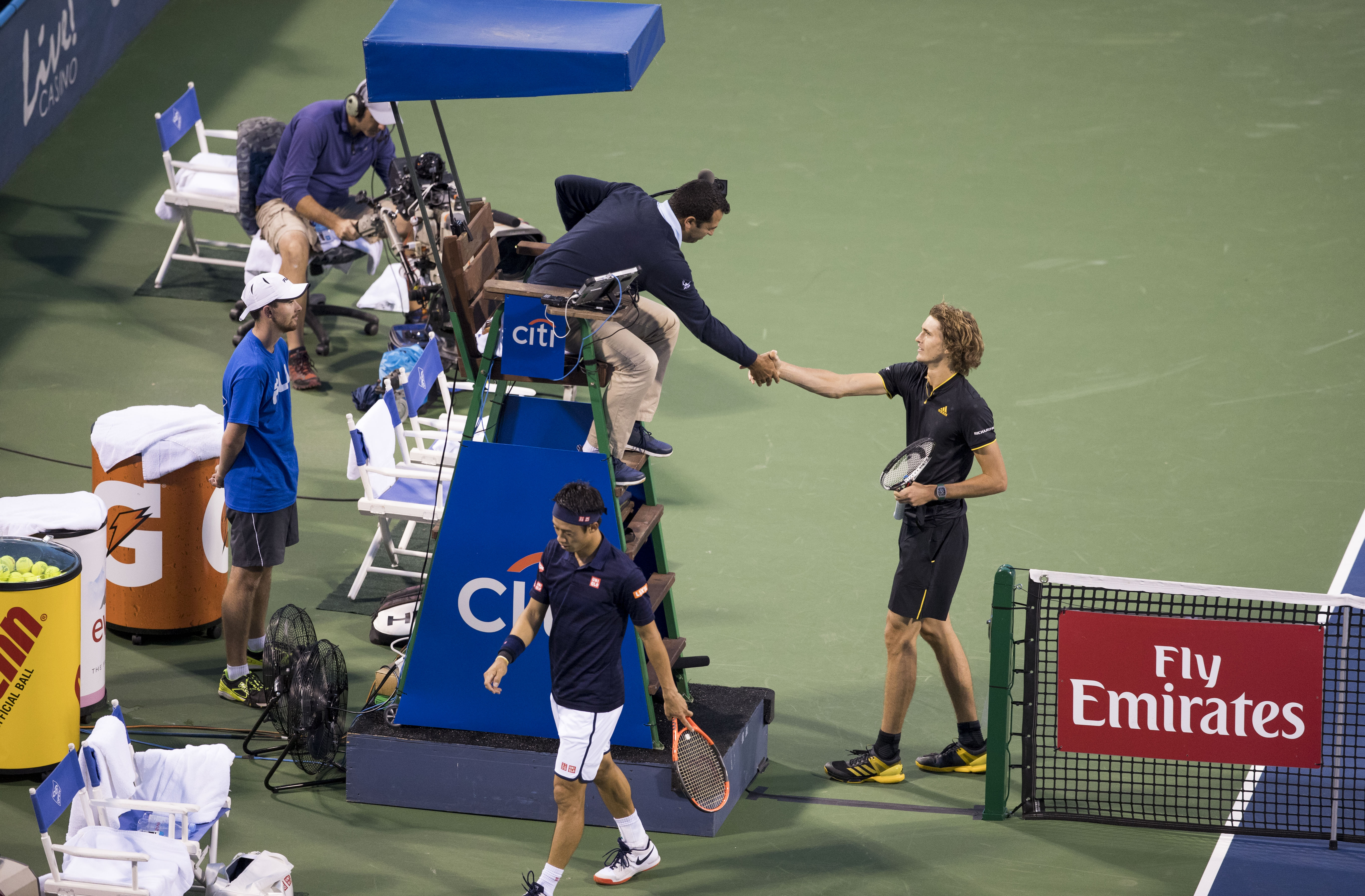 Citi Open Tennis 2017